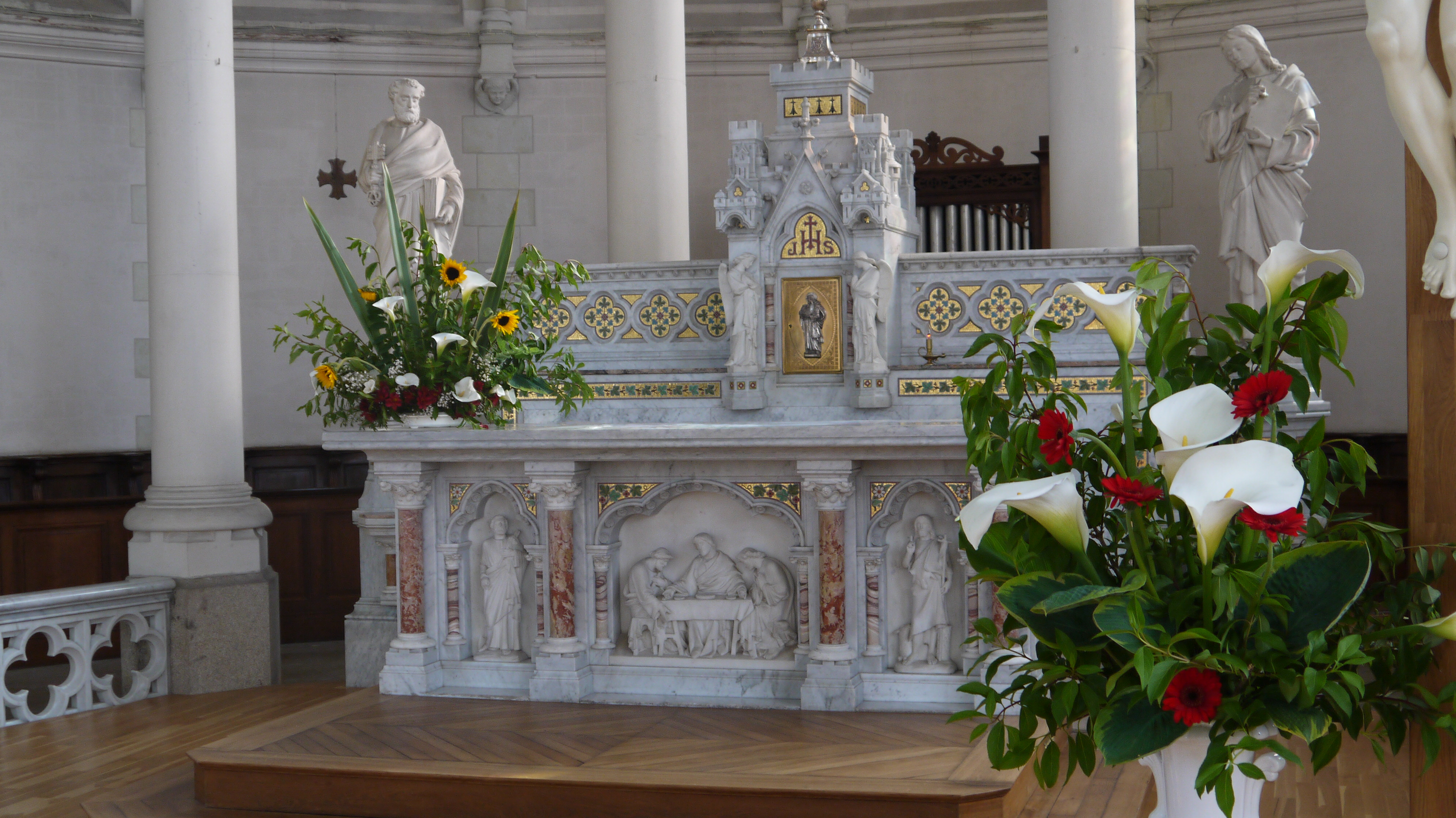 Le maître Autel de l'église Saint-Léger d'Orvault à Pâques.